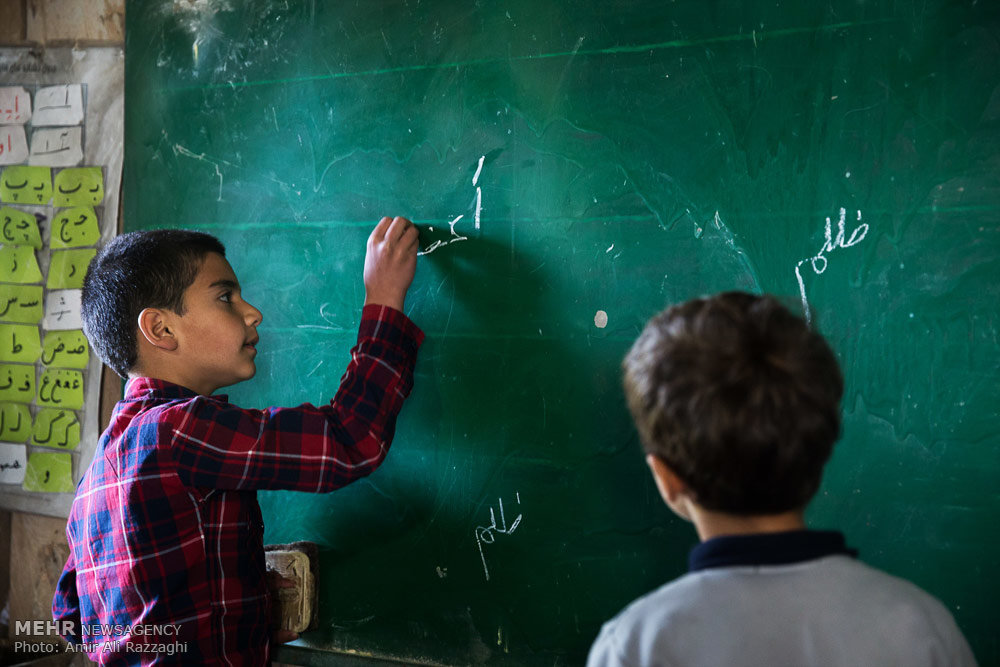 دبستان امام حسن المجتبی(ع) در منطقه صعب العبور روستای محروم اسبو استان مازندران از نداشتن آب آشامیدنی ، وسایل گرمایش برای فصل سرما ، سرویس بهداشتی ، تلفن ، گاز و همچنین جاده بسیار ناهموار رنج میبرد.